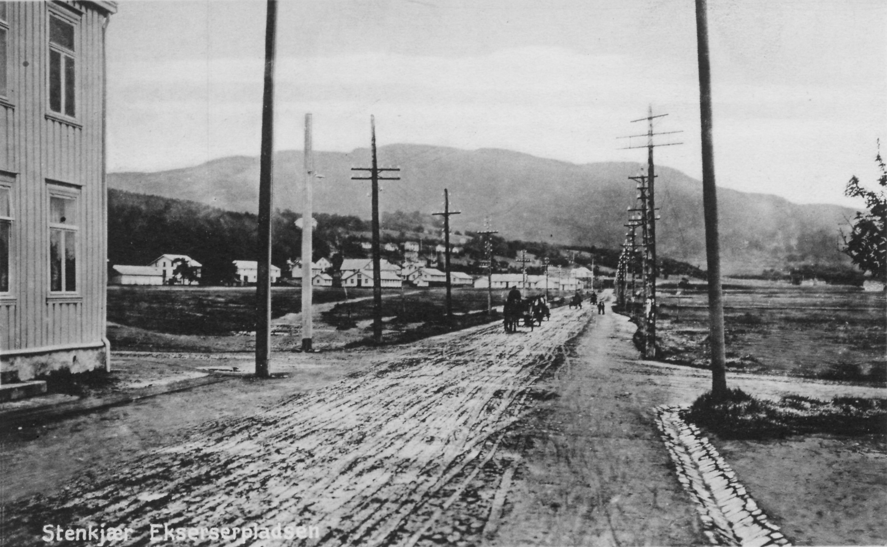 Steinkjersannan sett fra byen før andre verdenskrig. Bildet er tatt før 1910, men området så omtrent slik ut til andre verdenskrig. Veien er Riksvei 50, til 1970-årene E 6.